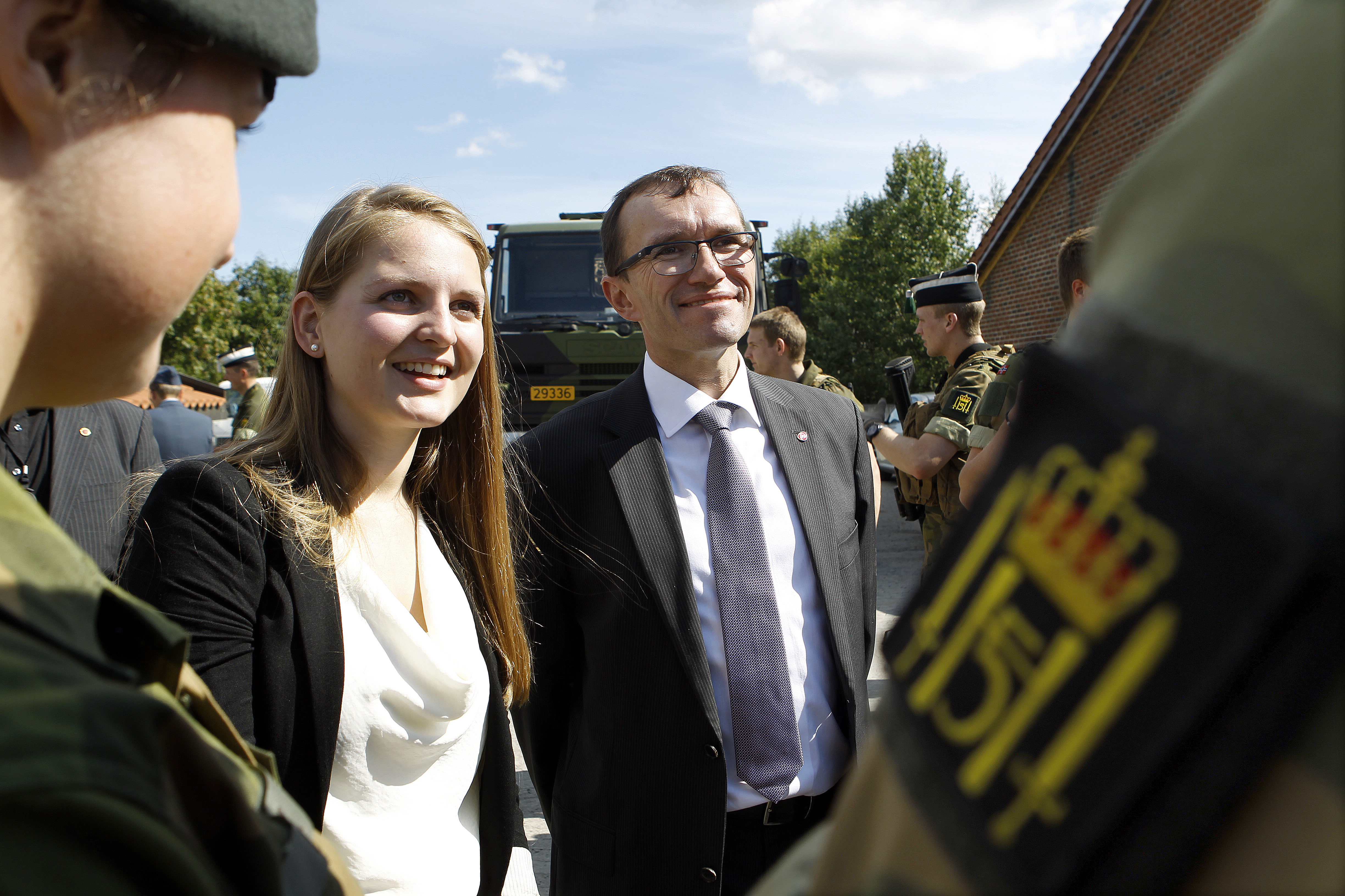 Espen Barth Eide fikk demonstrert Gardens beredskapsstyrke da han besøkte Huseby leir høsten 2012, ledsaget av Ingrid Aune. Foto: Torbjørn Kjosvold, Forsvaret